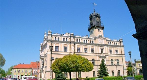 Jaroslaw (Polska)